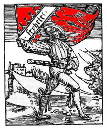 (Kolorierter Holzschnitt aus Thomas Murner: Von dem grossen Lutherischen Narren wie in doctor Murner beschworen hat.